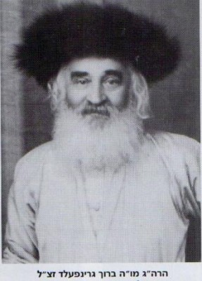 ייִדיש: ברוך גרינפעלד